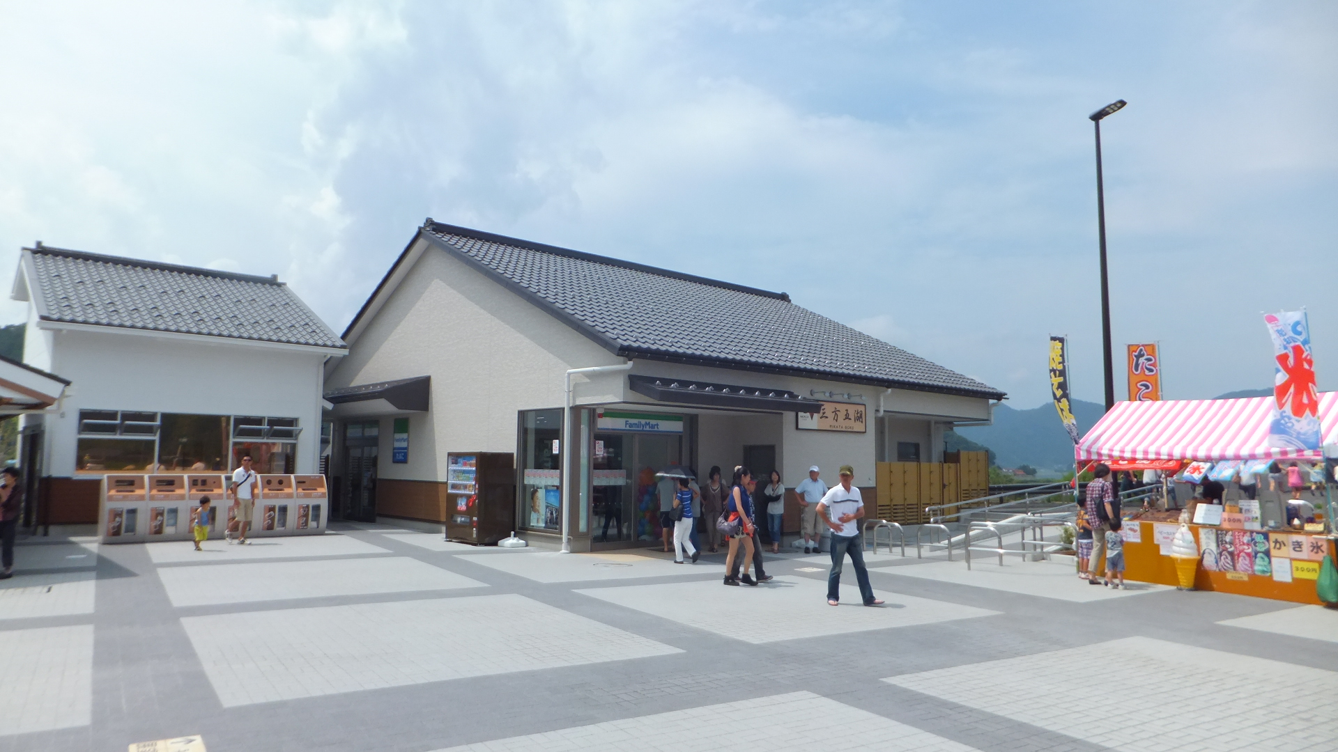 三方五湖パーキングエリア